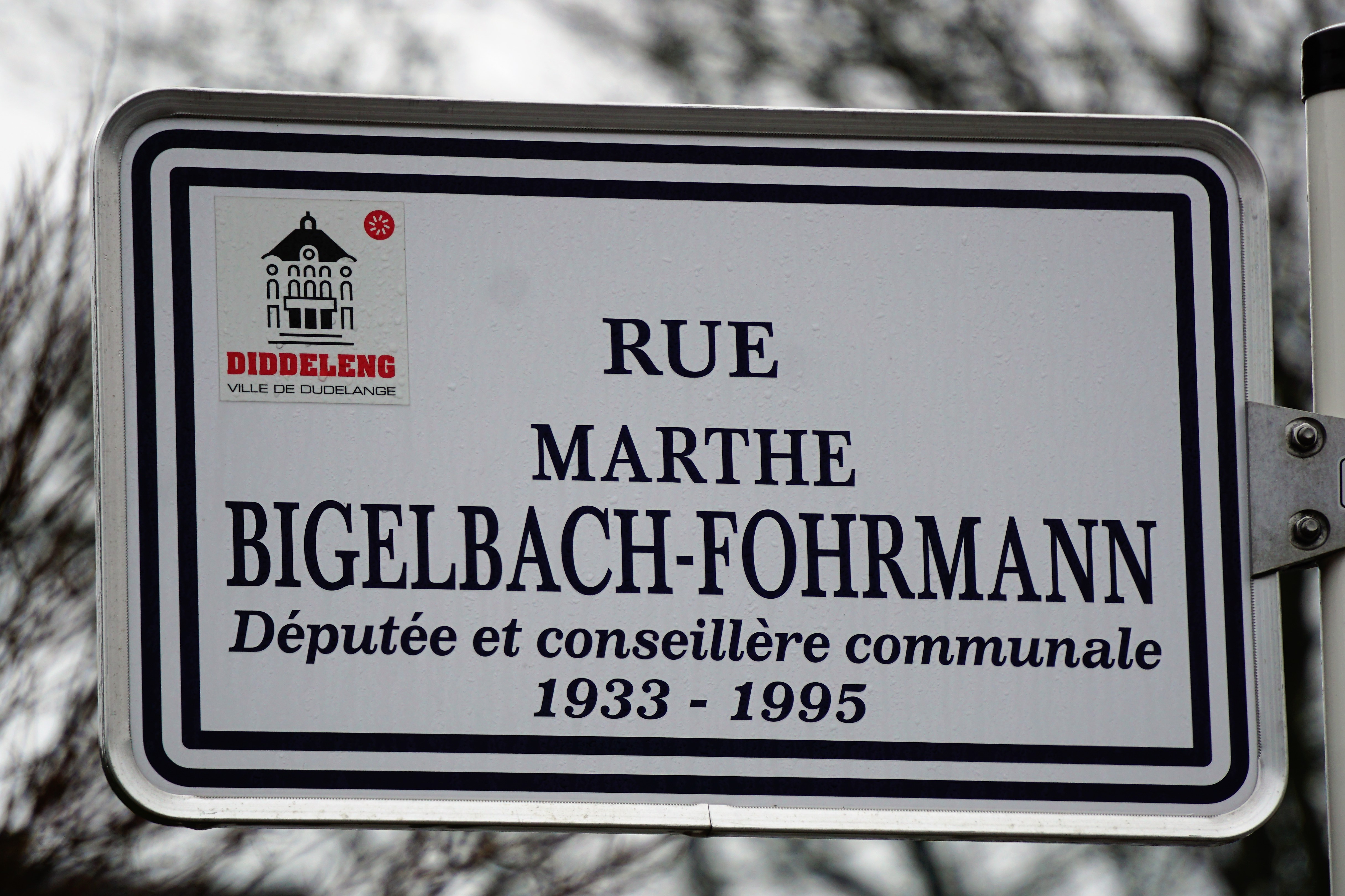 Plaque de nom de rue à Dudelange, quartier Lenkeschléi.